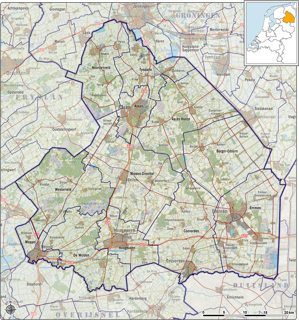 Kaart van de Nederlandse provincie Drenthe, met gemeentegrenzen per 2012 en impressie van het landschap. Referentie-ondergrond (kustlijn, steden, wegen) gerasterd uit de OpenStreet Map OSM. Inhoud is beschikbaar onder de Creative Commons Attribution-ShareAlike 3.0 license. Referentie-ondergrond op water bewerkt vanuit Gebruik is vrij met bronvermelding NLR en ESA. Vectorgrenzen van gemeenten op basis van het vrij te gebruiken geo-bestand van het CBS. Hoogte-aanduidingen (reliëf) gerasterd uit de AHN Viewer ( gebruik is vrij met bronvermelding (c) AHN, Overige kenmerken op de kaart: eigen tekenwerk.